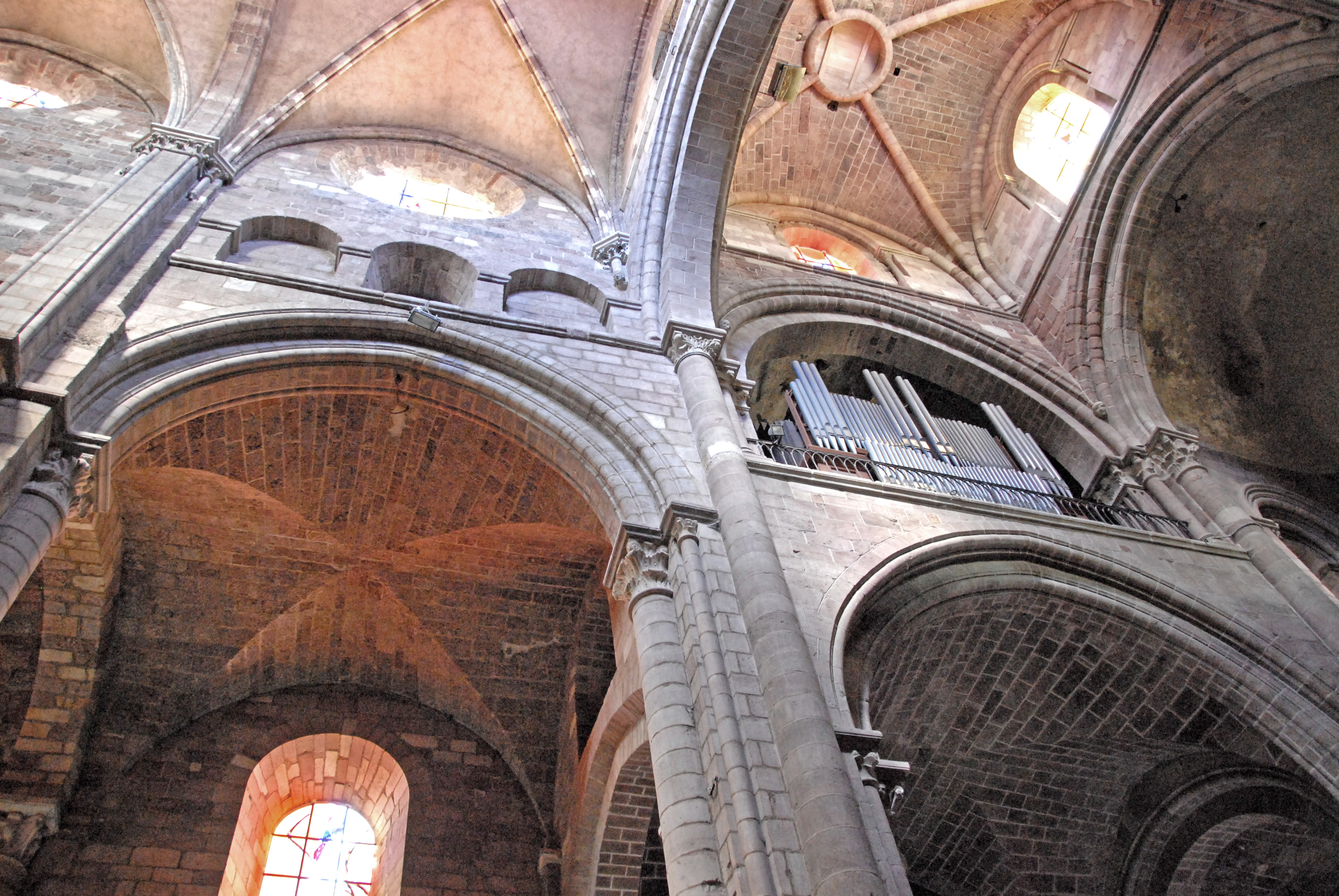 St.-Julien, Joch 5 und Querhaus (Orgel)